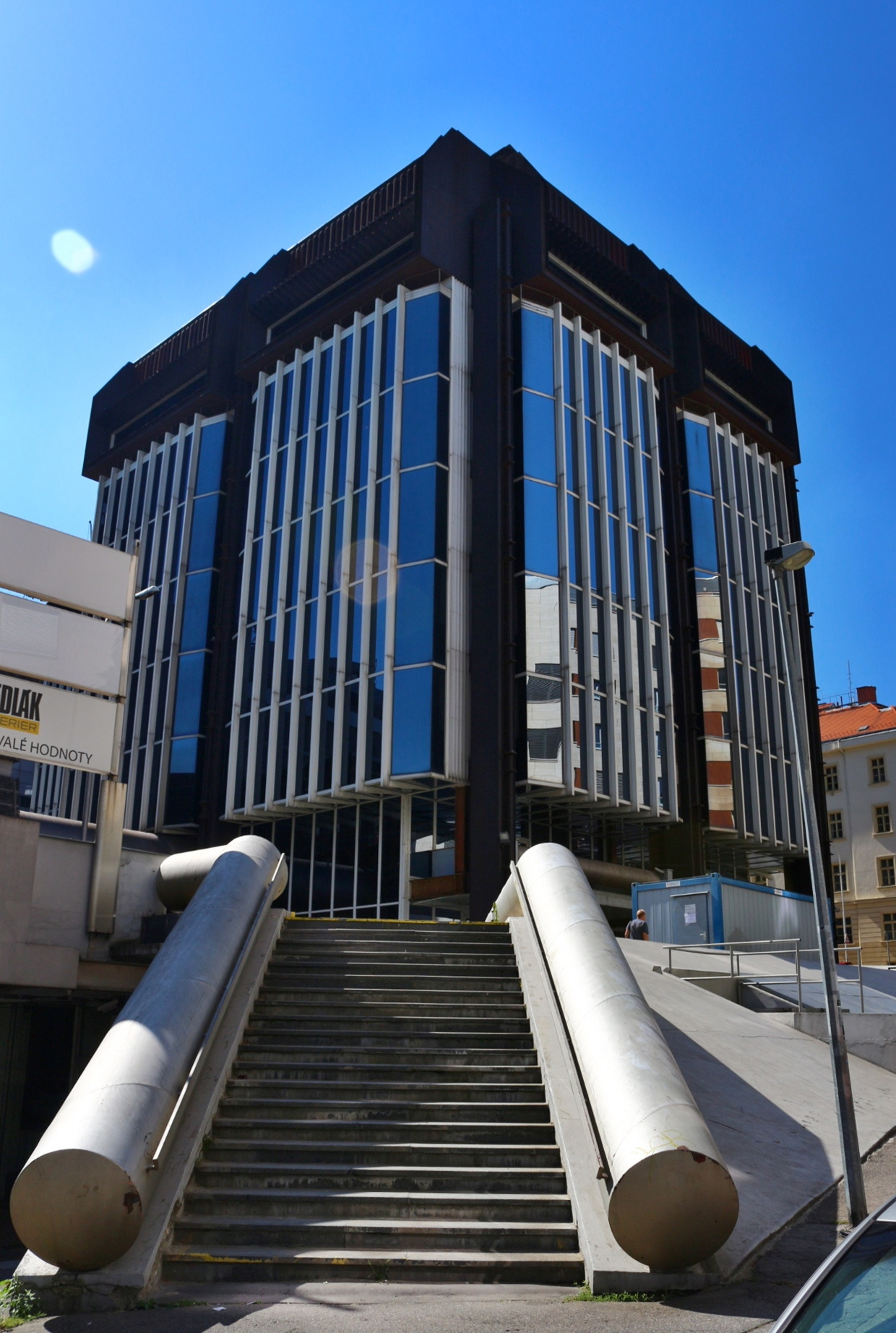 Hlavní budova Transgas Praha